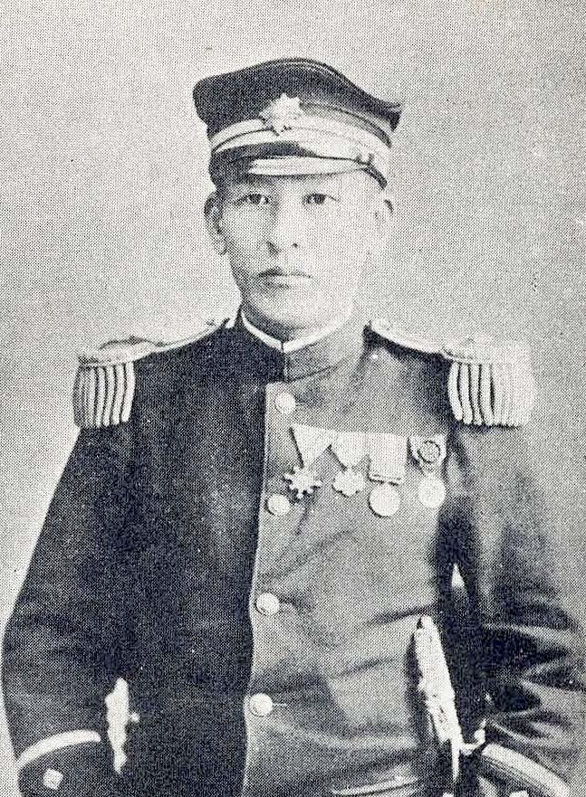 木下周一 Kinoshita Shūichi